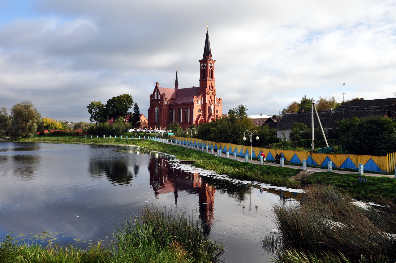 Беларуская (тарашкевіца): Касьцёл Сьв. Антонія Падуанскага. г. Паставы